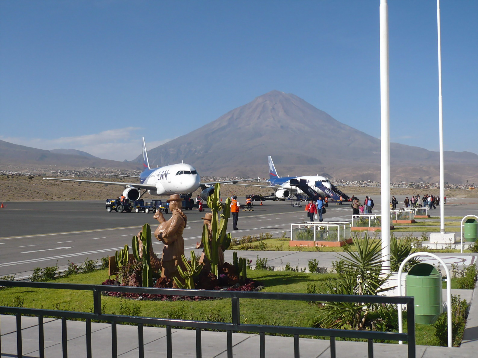 Vista de la pista de parqueo del Aeropuerto Internacional Rodriguez Ballón (SPQU) de la ciudad de Arequipa, se aprecia dos aviones Airbus de LAN Perú, en primer plano las esculturas que representan a los pobladores de la provincia de Caylloma, donde se halla el Cañón del Colca, una madre sosteniendo una alpaca acompañada de sus niños recibiendo a los visitantes, al fondo el Misti, lamentablemente desprovisto de su tradicional manto de nieve, pero inigualablemente majestuoso.